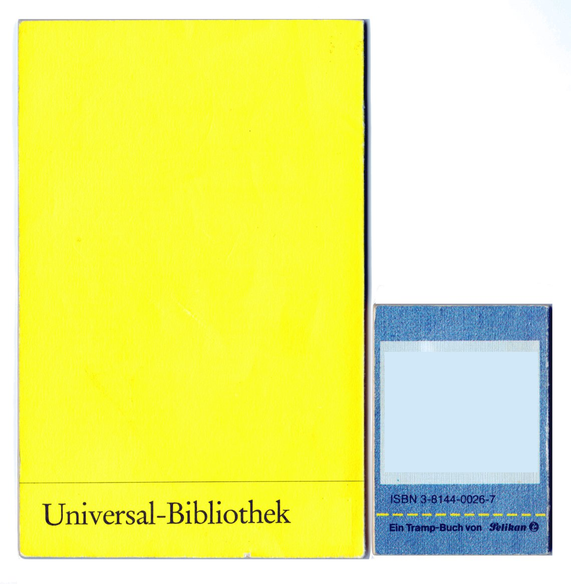 Größenvergleich altes Reclam-Buch und Tramp-Buch der 80er hier Witzsammlung (Pelikan AG), jeweils Rückseite, Klappentext entfernt